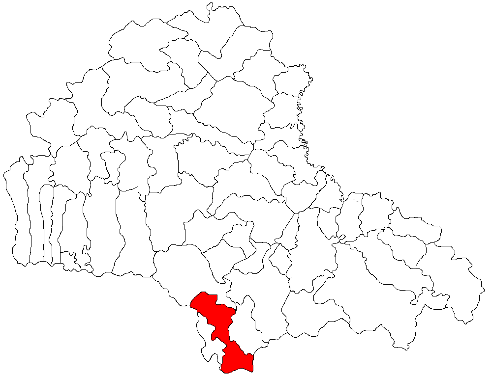 Categorie:Hărţi ale judeţului Braşov